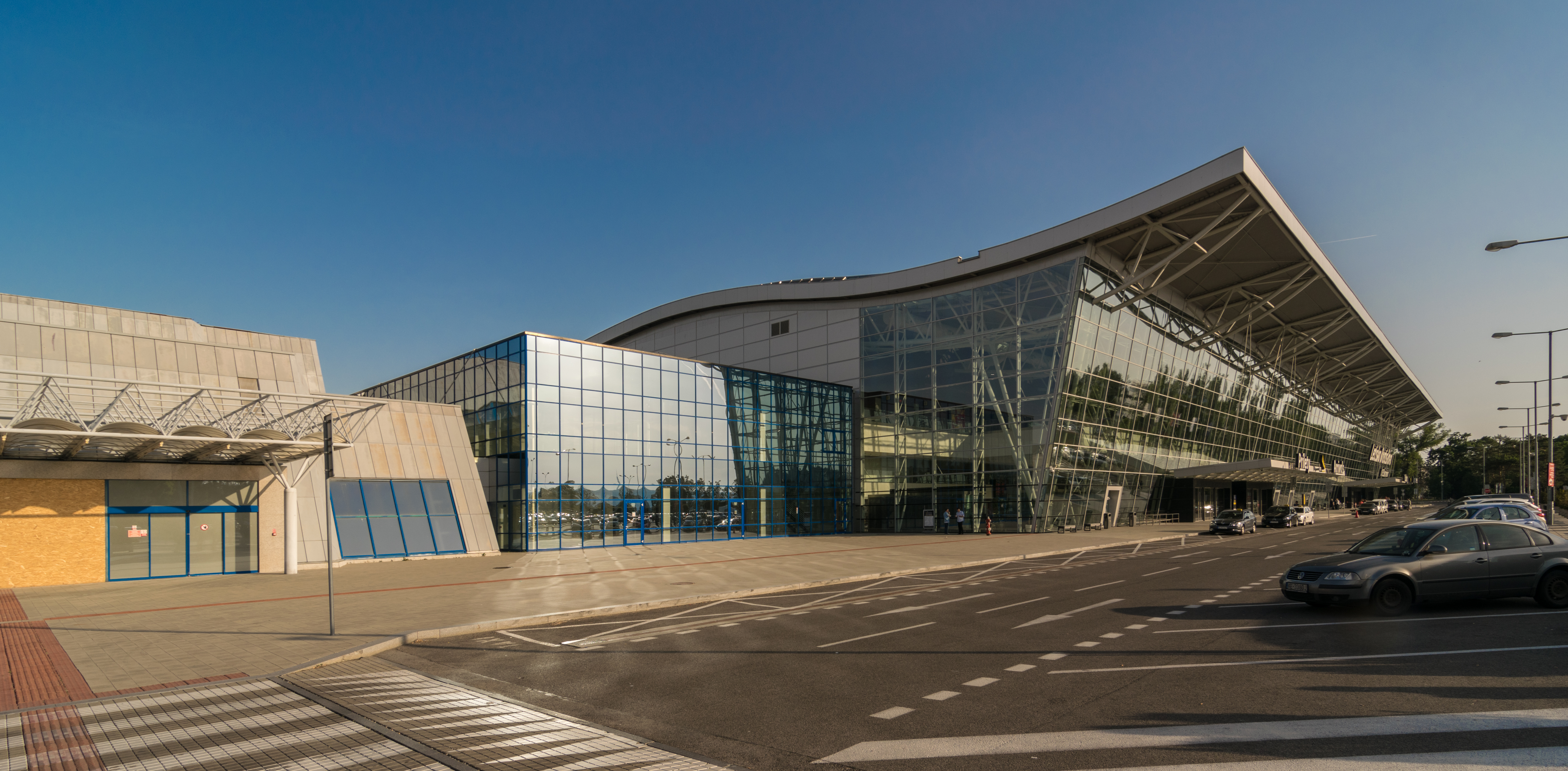 M. R. Štefánik Airport